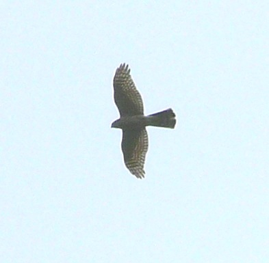 Gavilán en vuelo (Redes, Asturias).